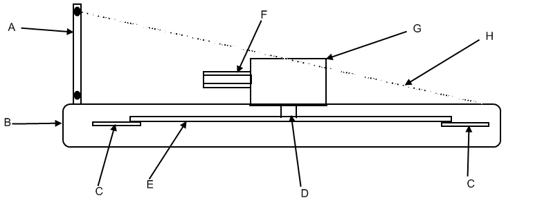 Schéma sommaire décrivant la forme globale d'un gyrobroyeur à une lame.